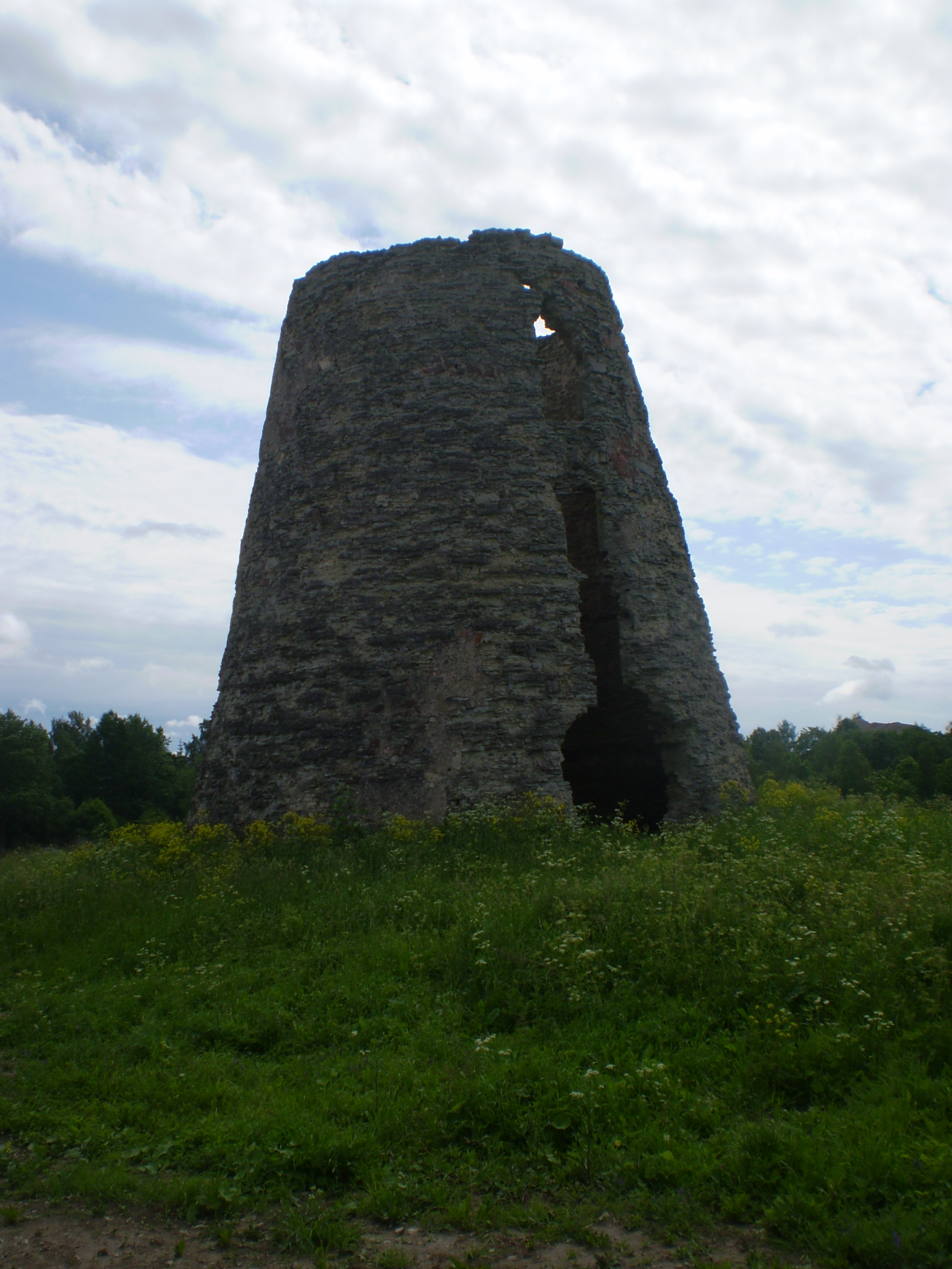 Jõhvi tuuleveski 19. saj